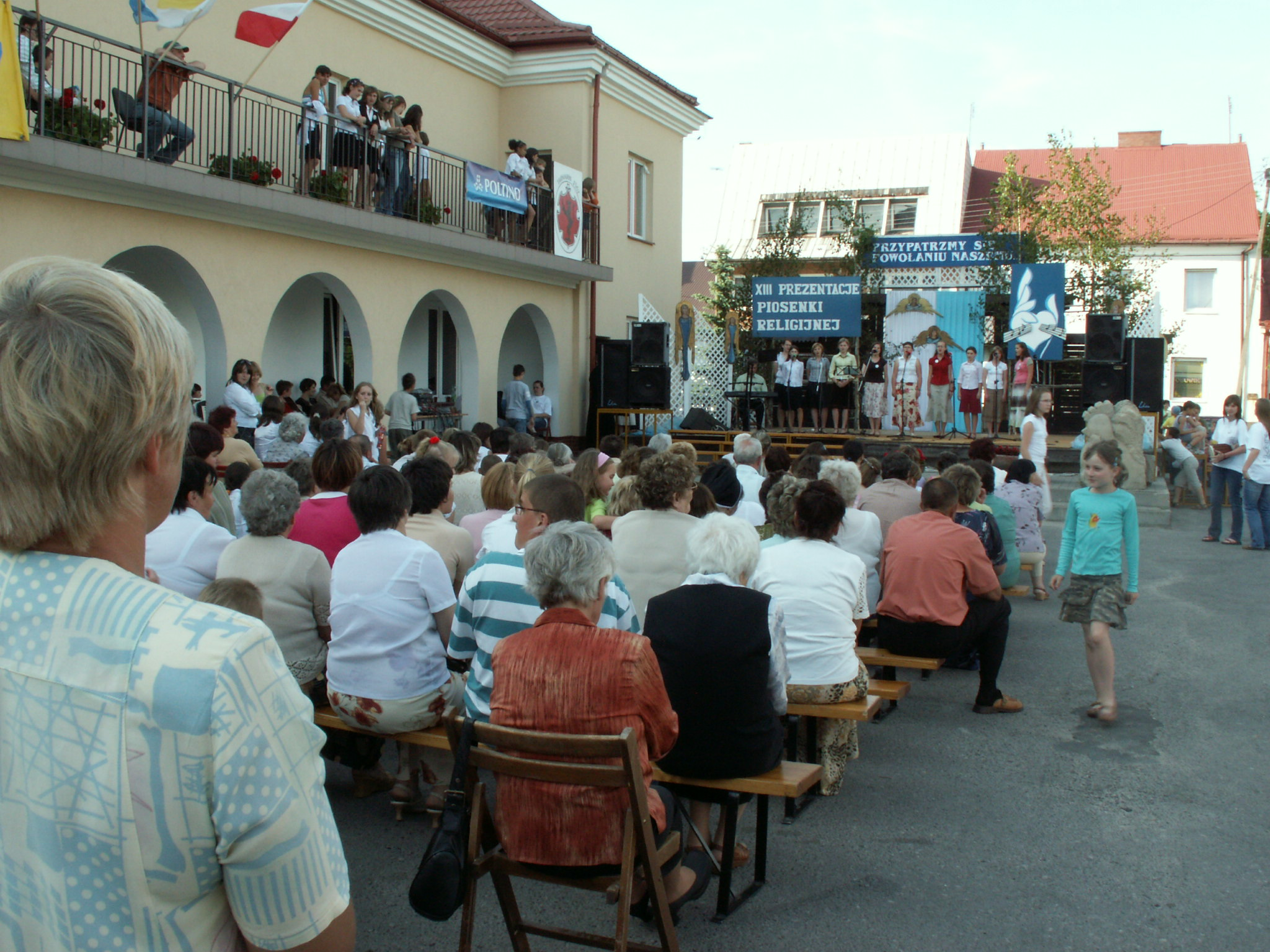 XIII Prezentacje Piosenki Religijnej w Tarnogrodzie